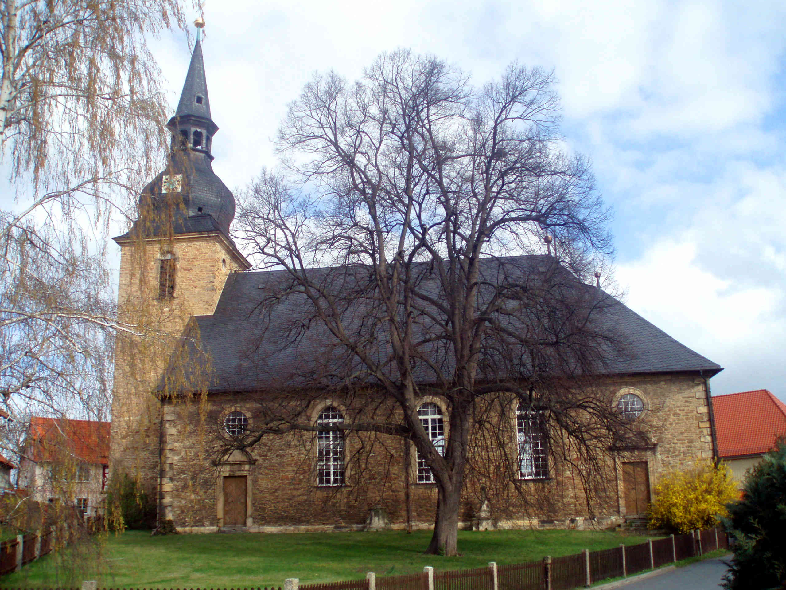 Evangelische Kirche Heimburg